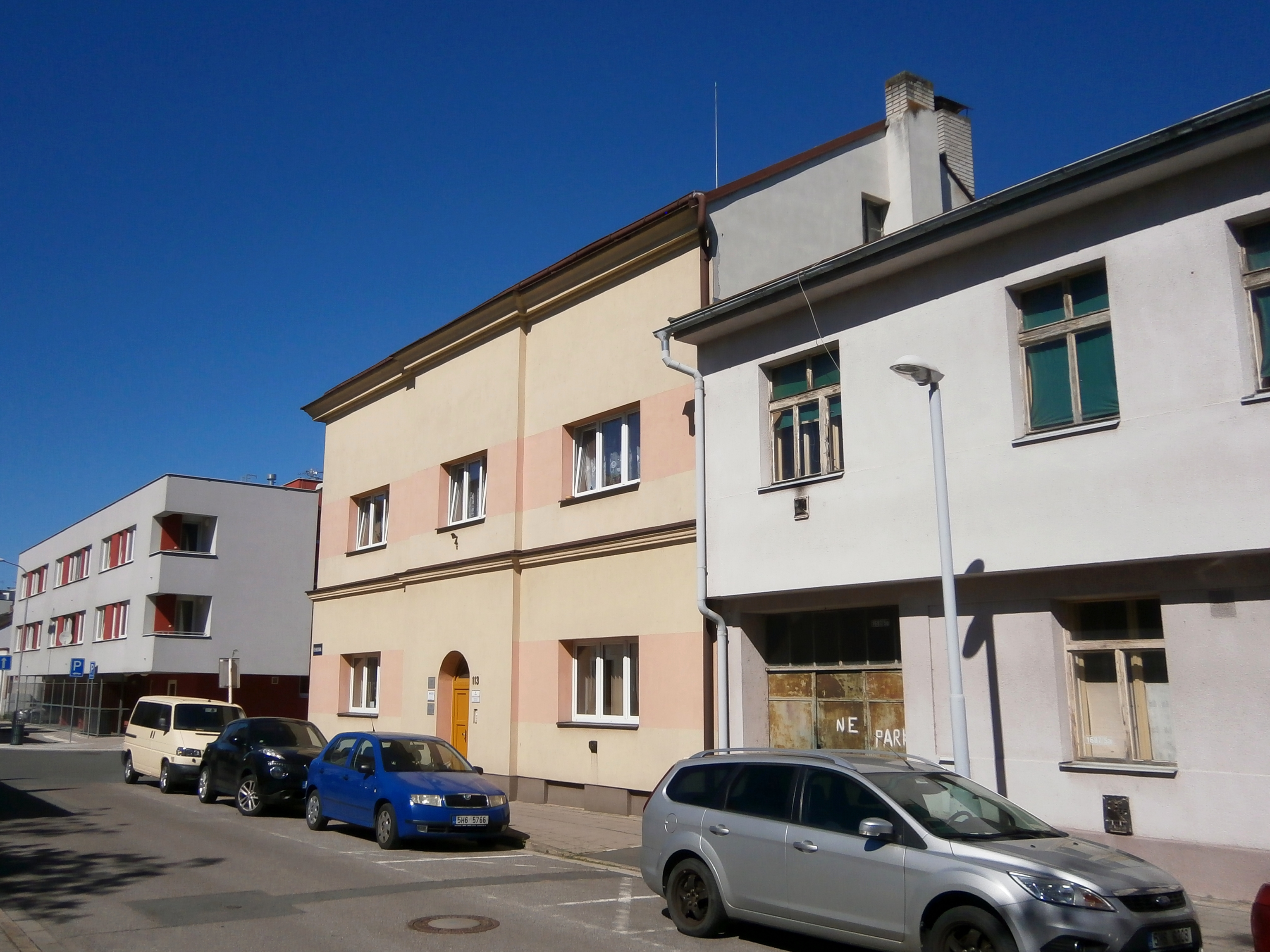 Všehrdova čp. 113 (Hradec Králové)